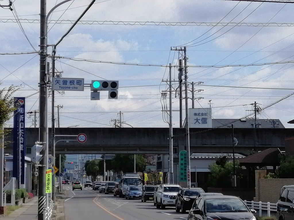 The elevated line between Nishio and Fukuchi stations at Yazone-cho (digital zoomed)